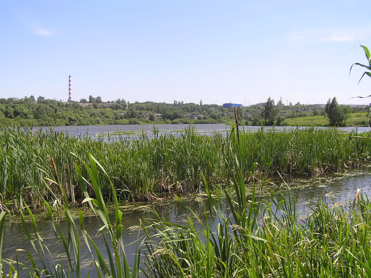 Наливной биопруд г. Железногорск